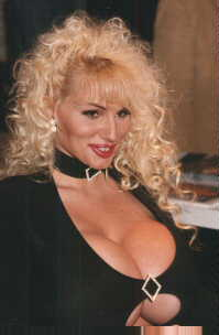 Lisa Lipps